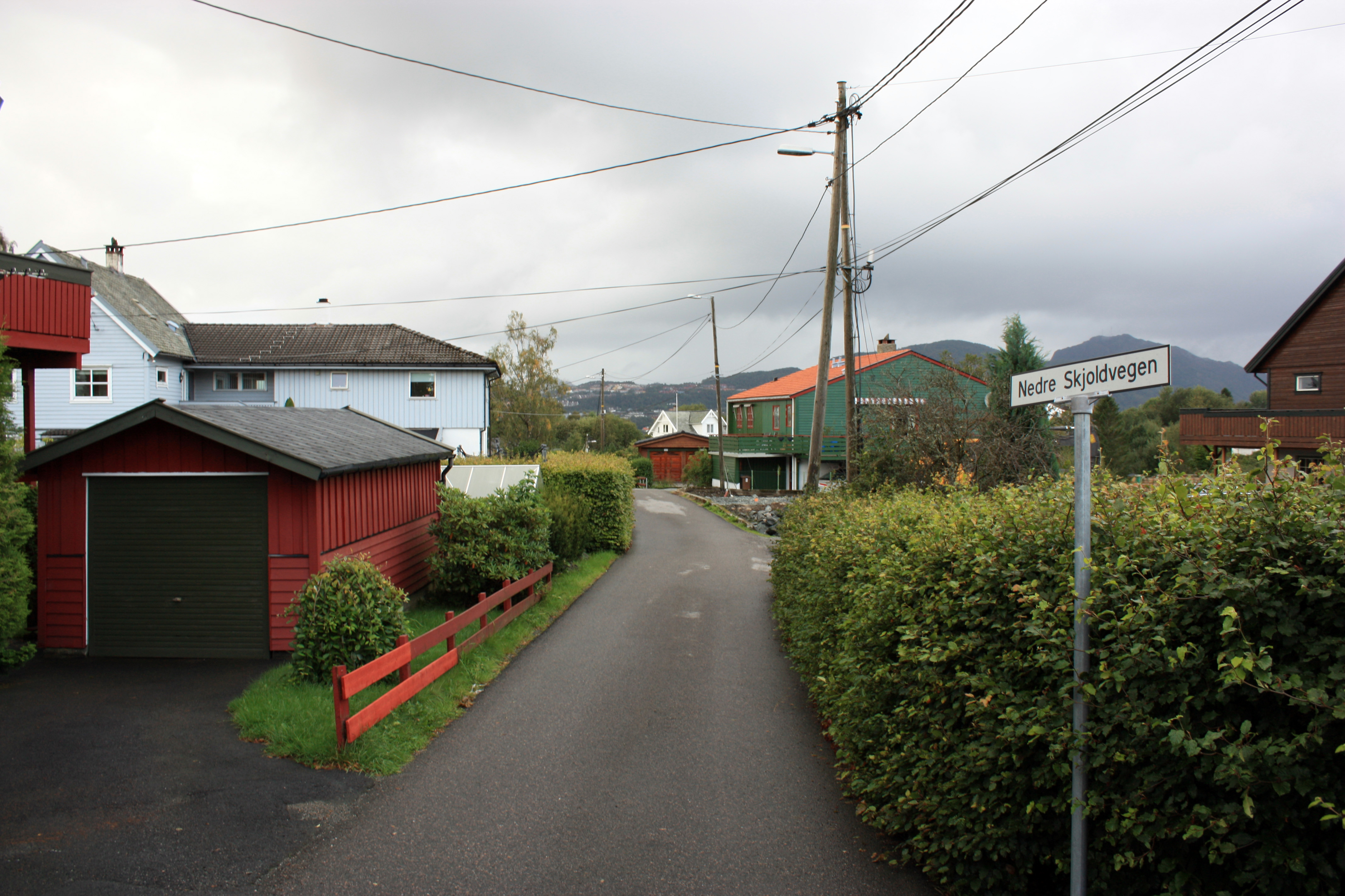 Nedre Skjoldvegen, Fana, Bergen.